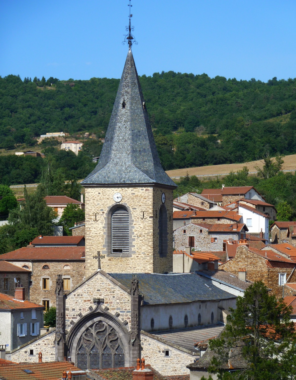 Eglise de la paroisse catholique de Massiac, Cantal, France